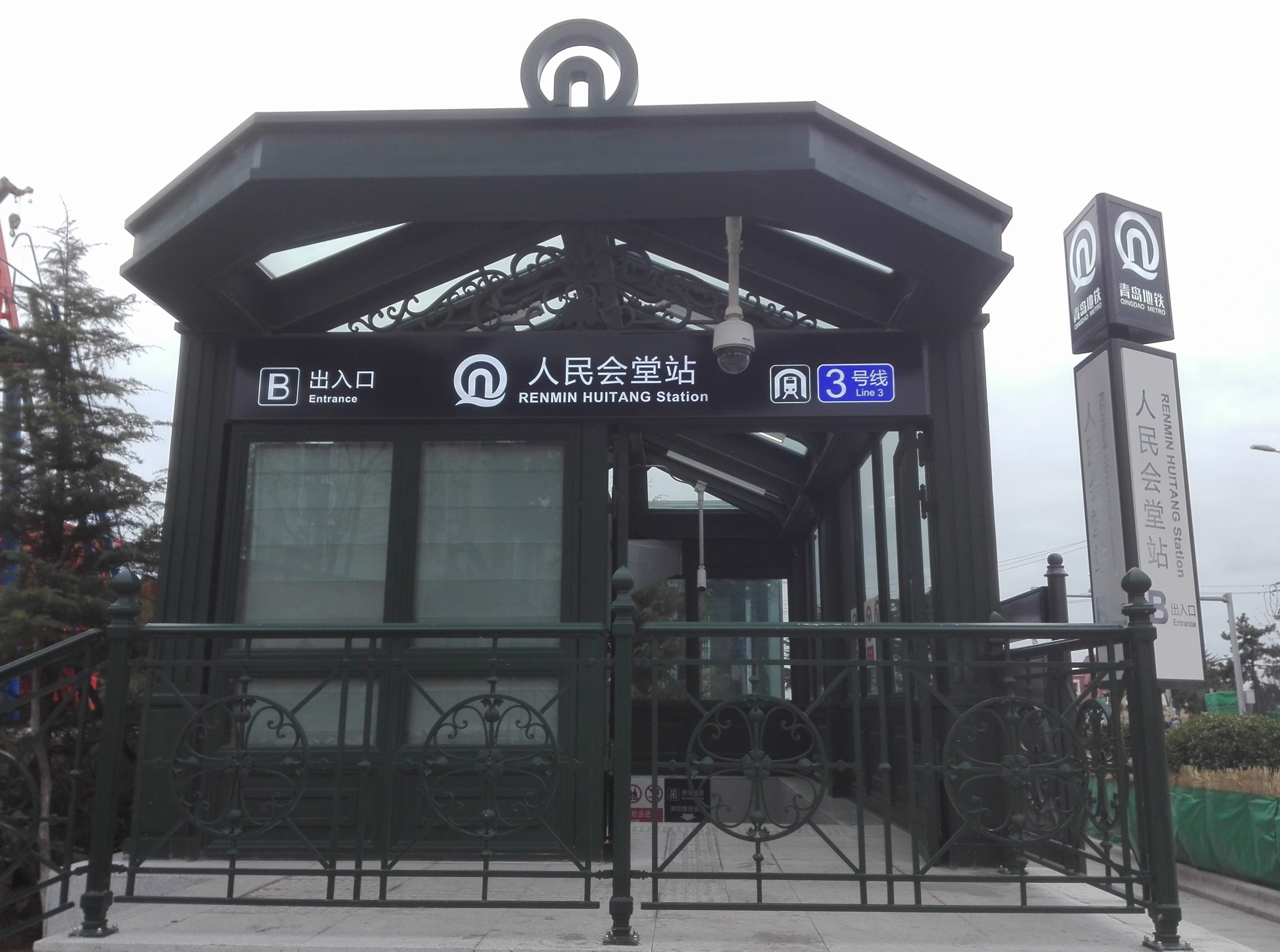 人民会堂站B口